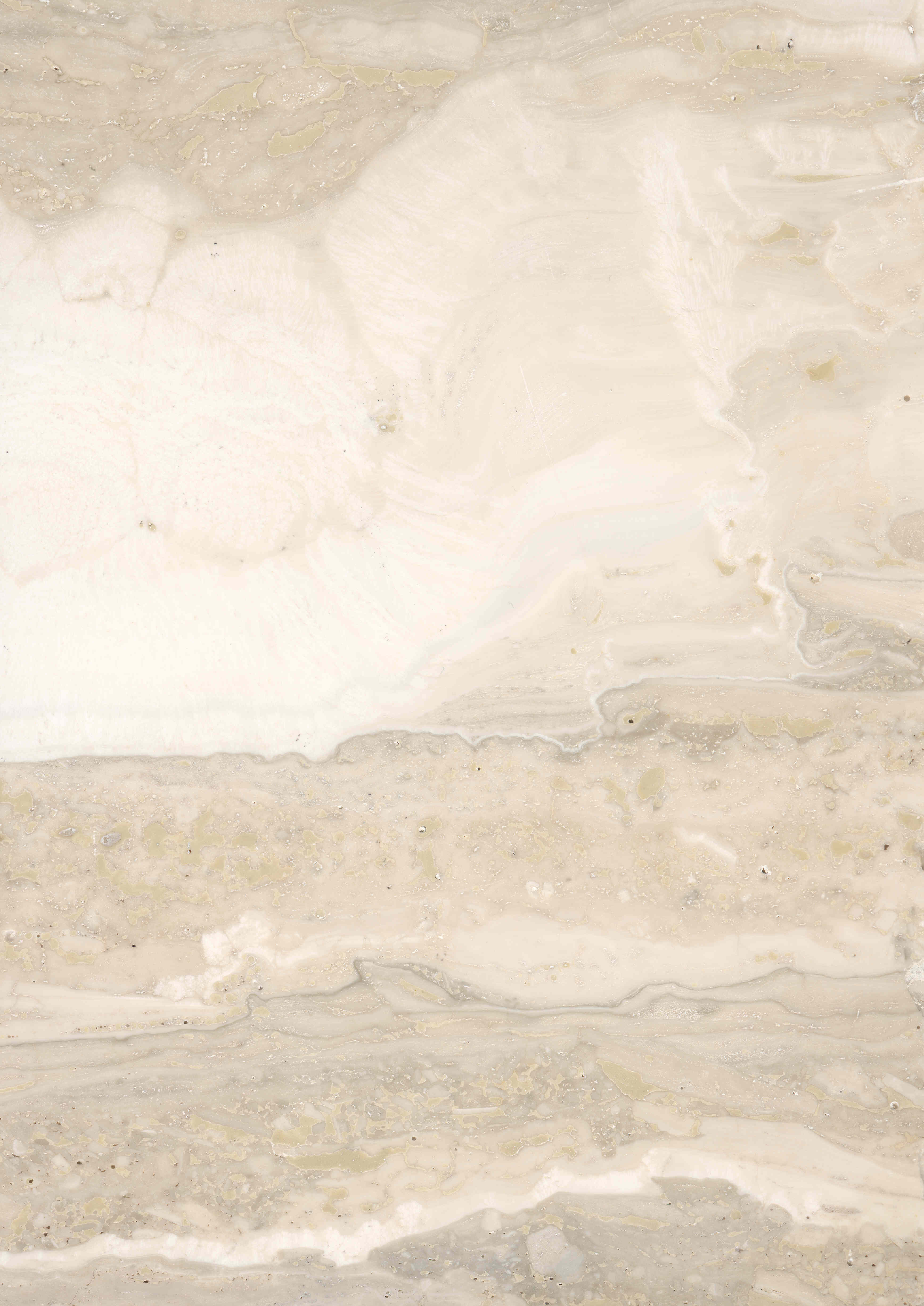 Travertin Toscana